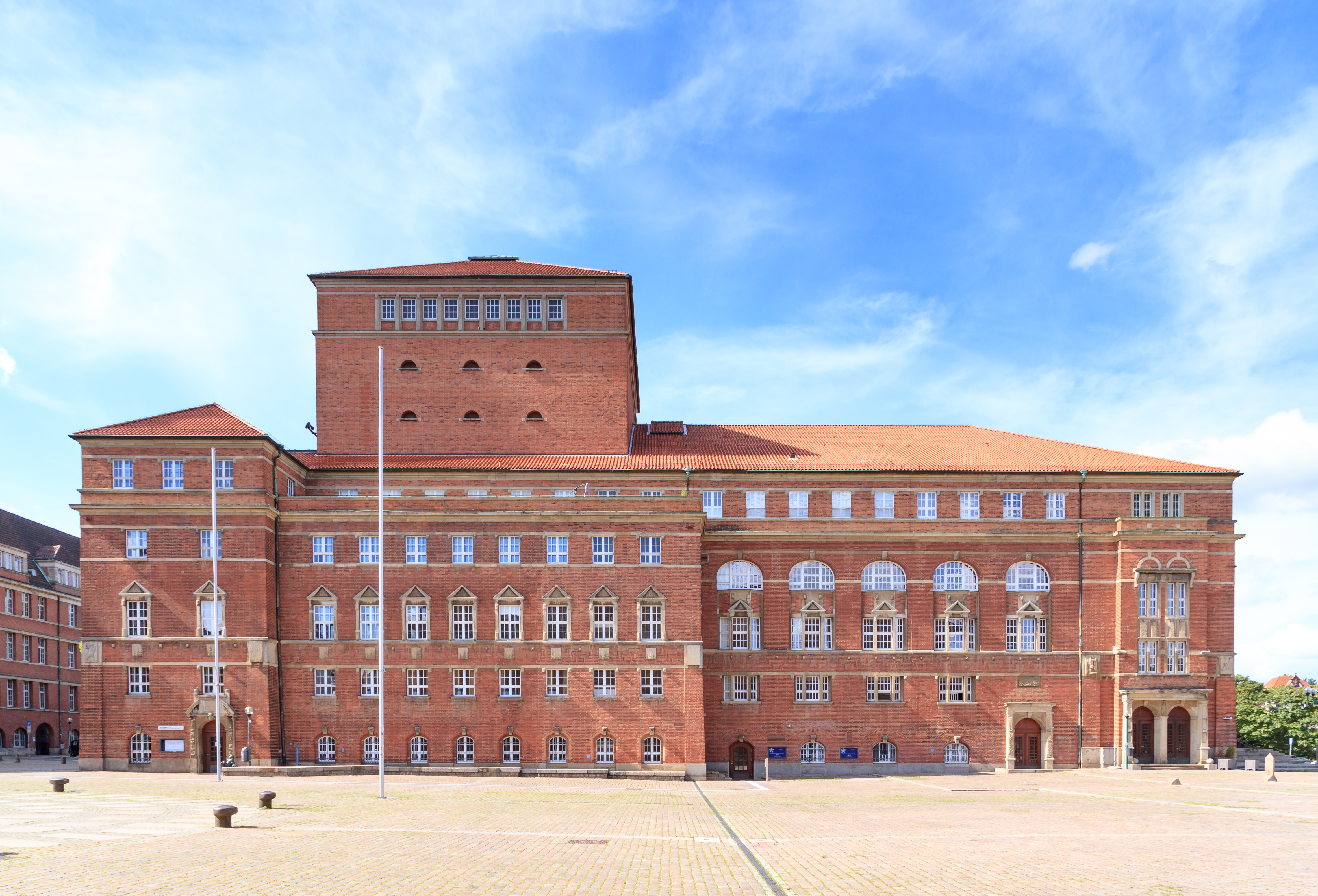 Opernhaus Kiel